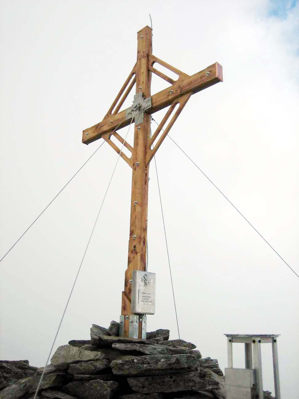 Gipfelkreuz auf dem Gigalitz (3002 m)